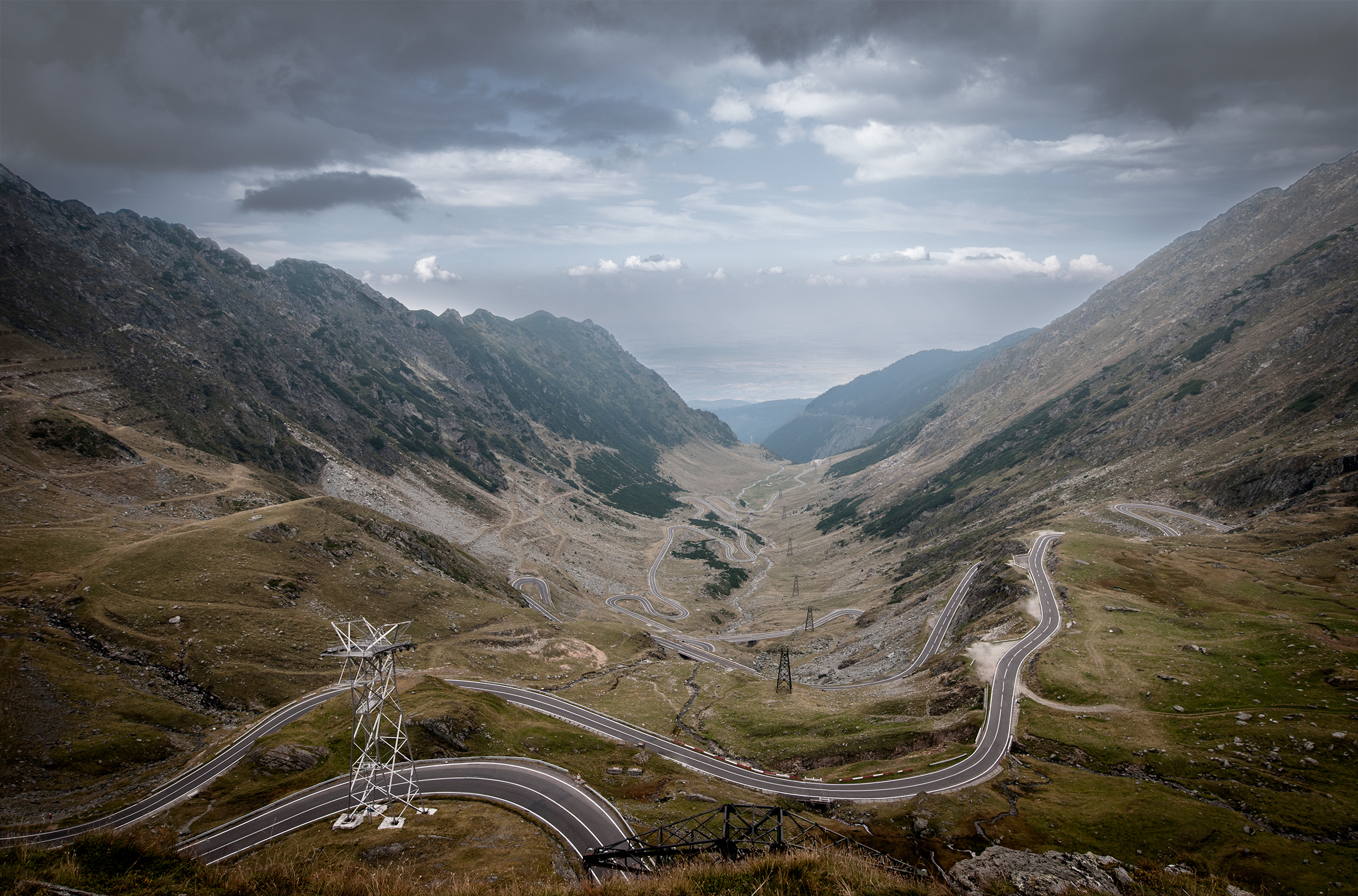 Transfagarasan Hochstraße